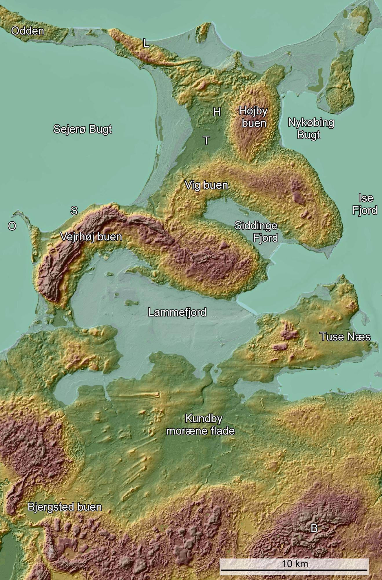 Digital højdemodel af Odsherred